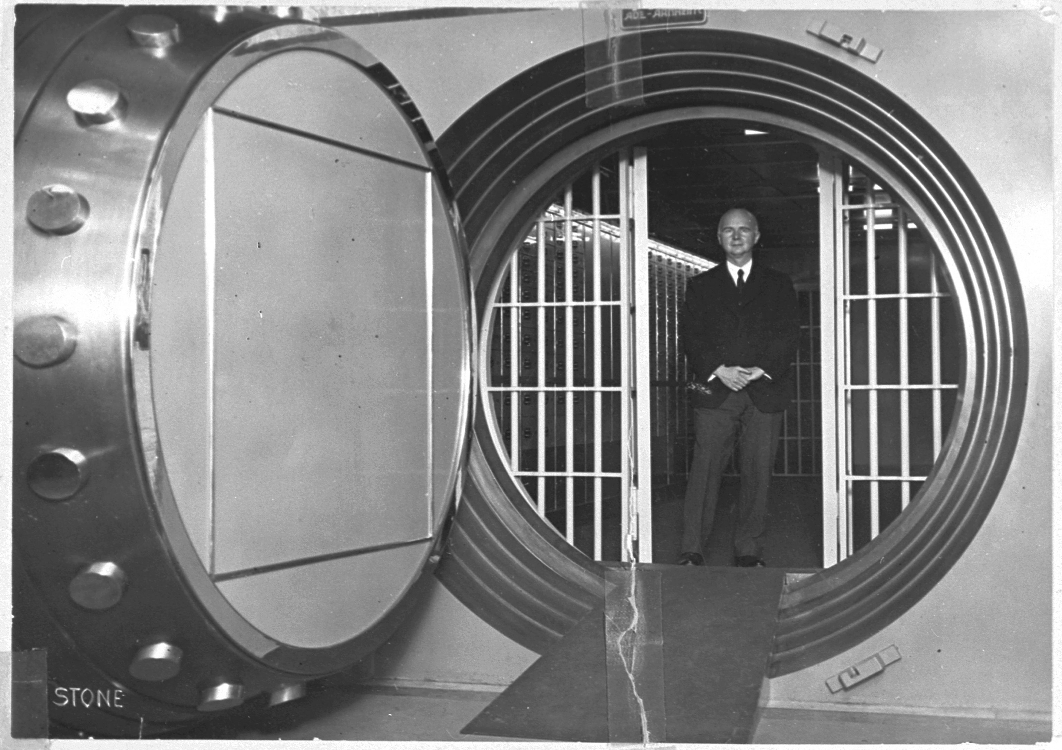 Eduard von der Heydt im Tresor der Von der Heydt‘s Bank AG, Berlin, Schwarz-Weiss-Fotografie